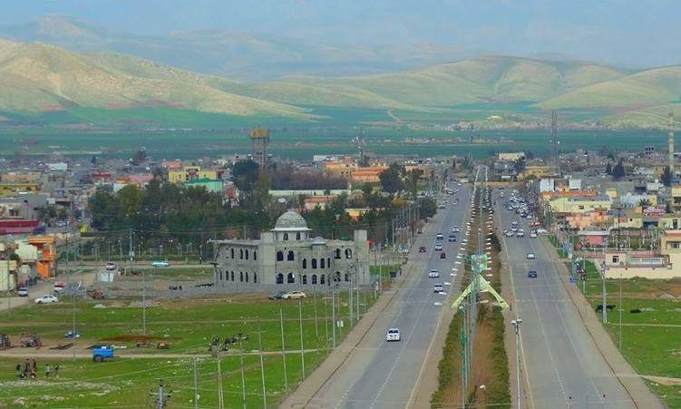 کوردی: وێنەی قەزای شارەزوور